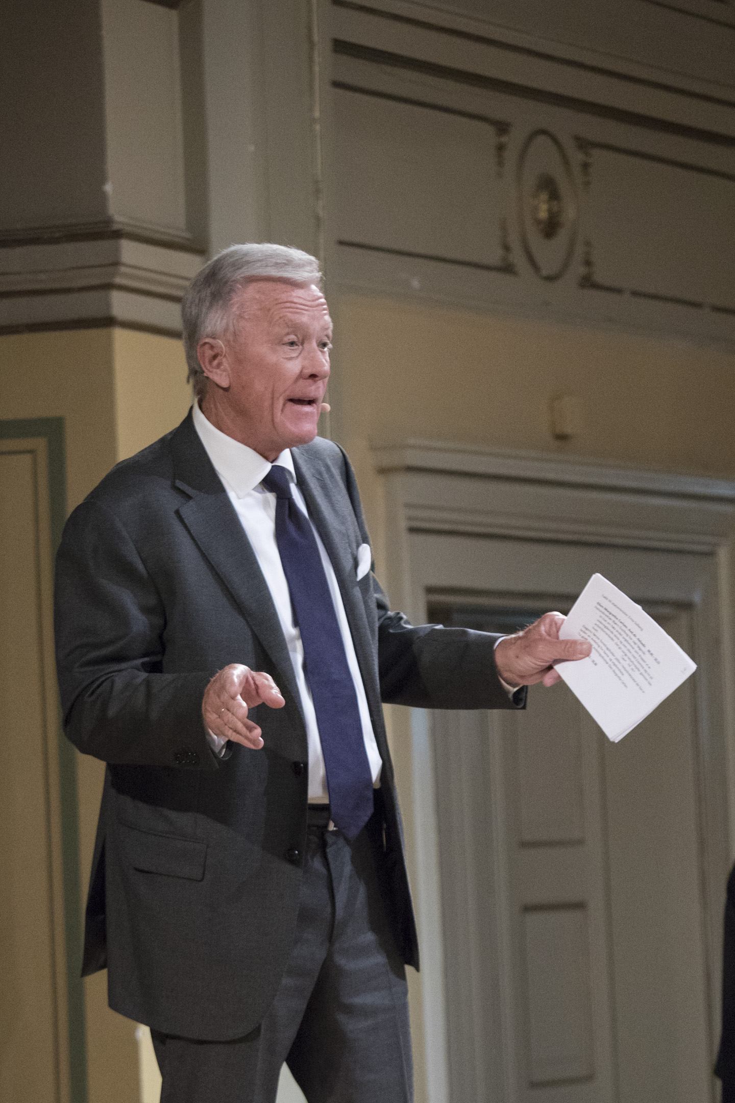 Oddvar Stenstrøm som konfransier på Mental Helse sin Jubileumskonferanse i 2018.